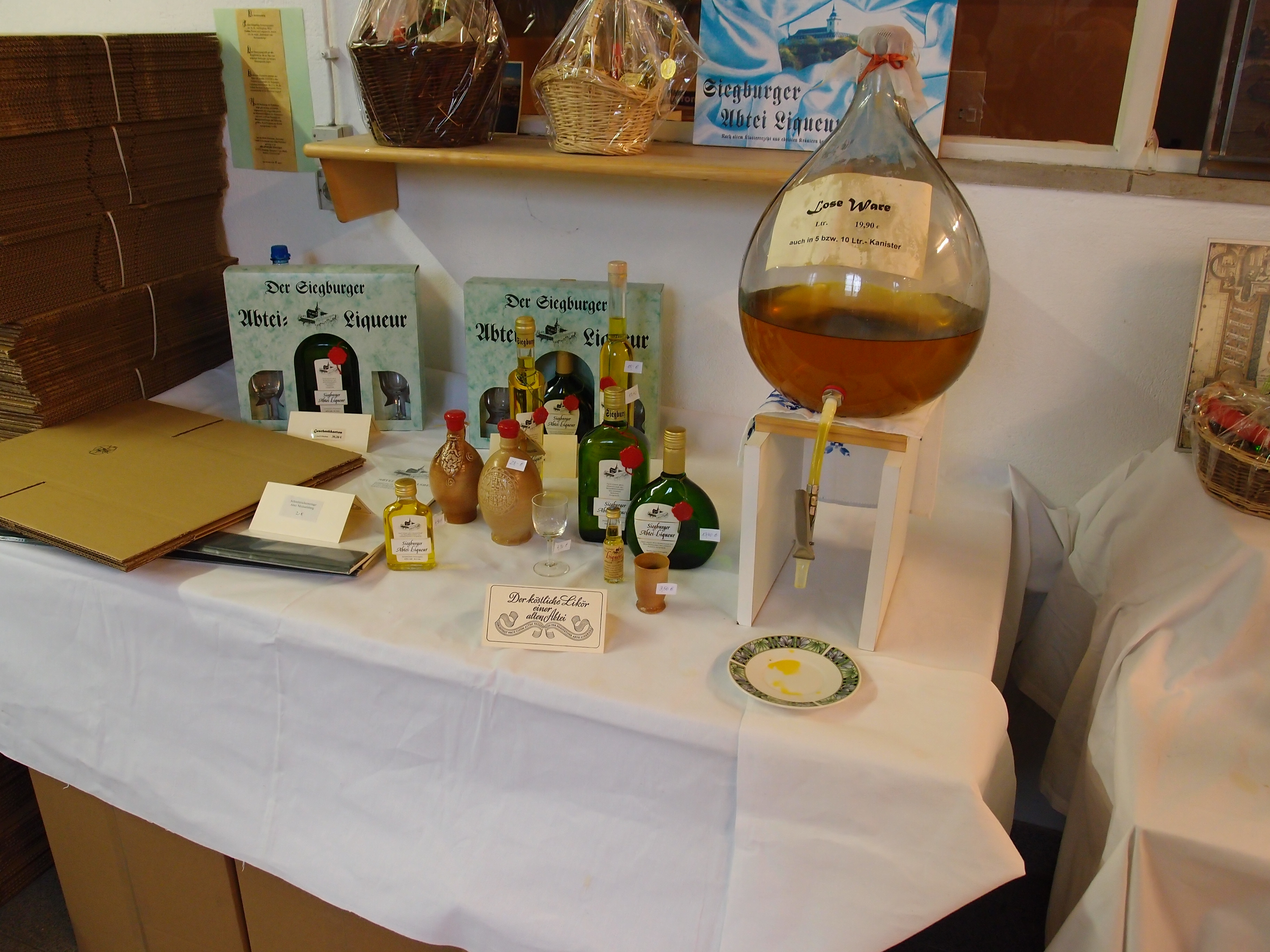 Siegburger Abtei-Liqueur-Manufaktur (Teilansicht der Produktpalette) Datum: 02.02.2013 Urheber: M. Pfeiffer alias Benutzer:Gordito1869 Quelle: privates Fotoarchiv des Urhebers